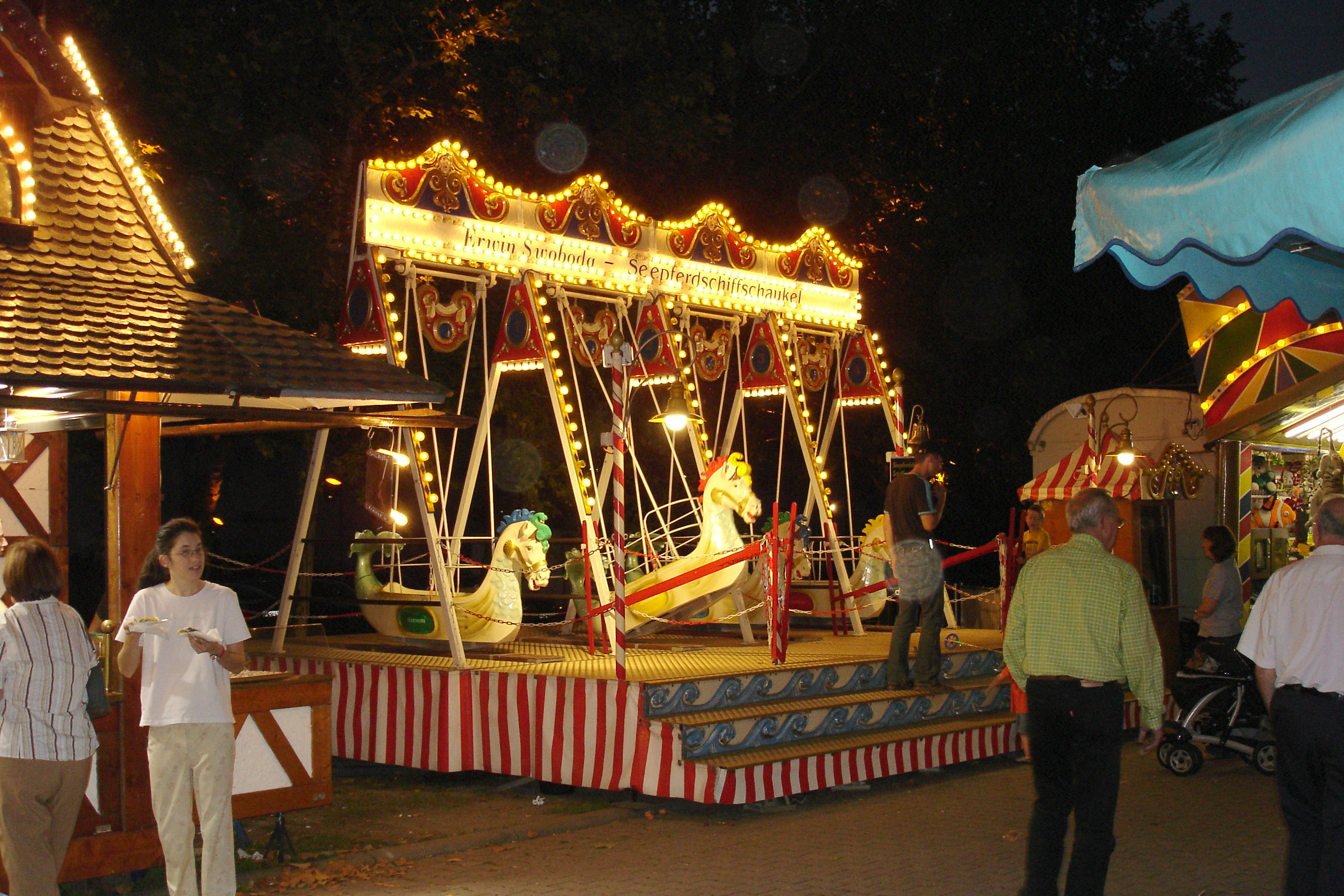 Schiffschaukel auf dem Berger Markt bei Nacht